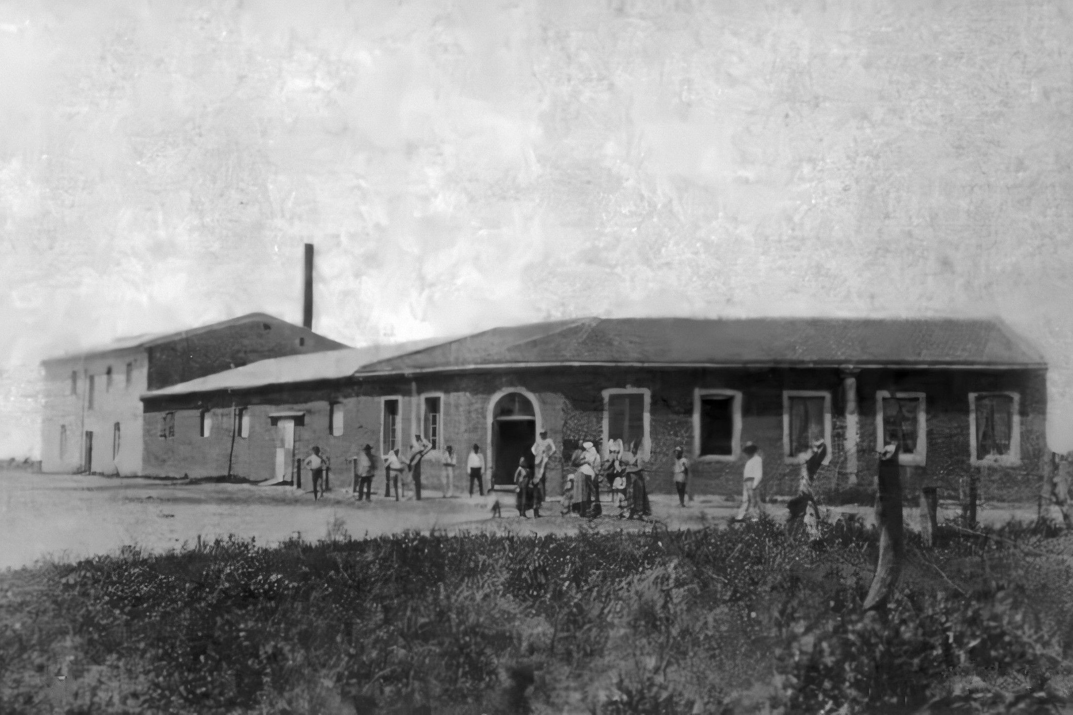 Ilustración de establecimiento industrial